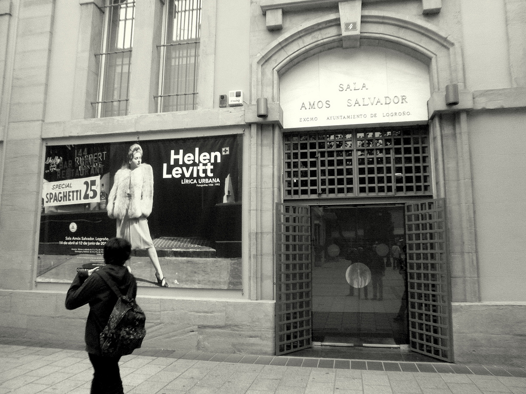 Exposición de Helen Levitt en la Sala Amos Salvador